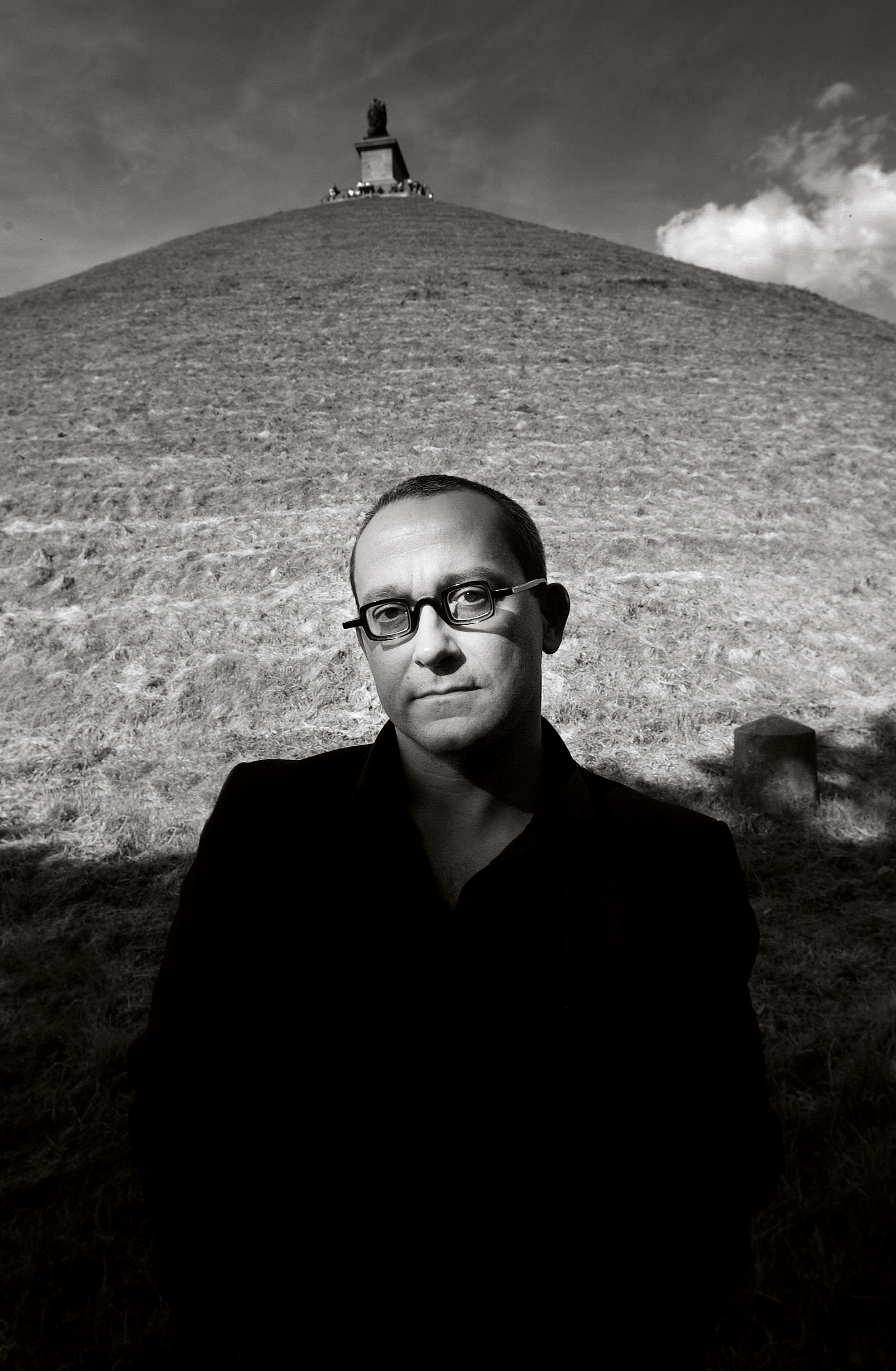 De schrijver Tom Lanoye in Waterloo